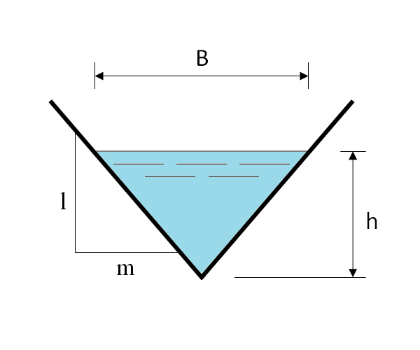 Éléments géométriques pour une section de canal triangulaire.